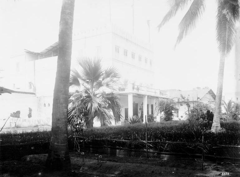 Pangani, Haus der D.O.A.G. [Deutsch Ostafrika Gesellschaft]